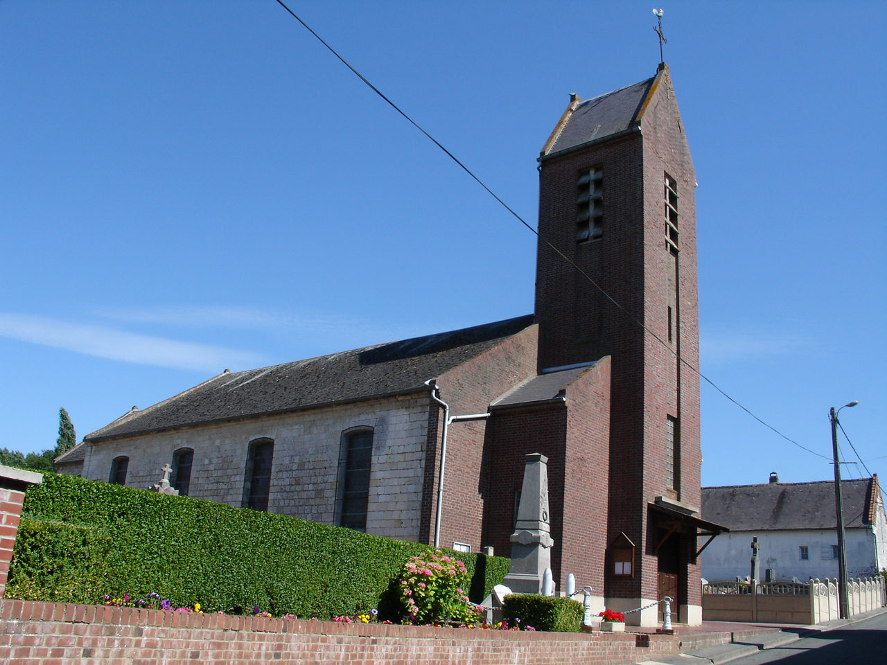 Église de Souastre